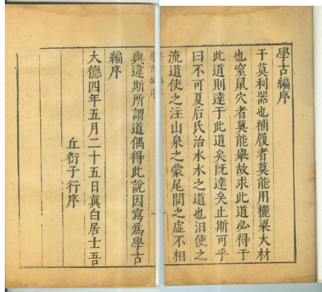 中文（台灣）: 吾丘衍《學古編》（明刻善本）